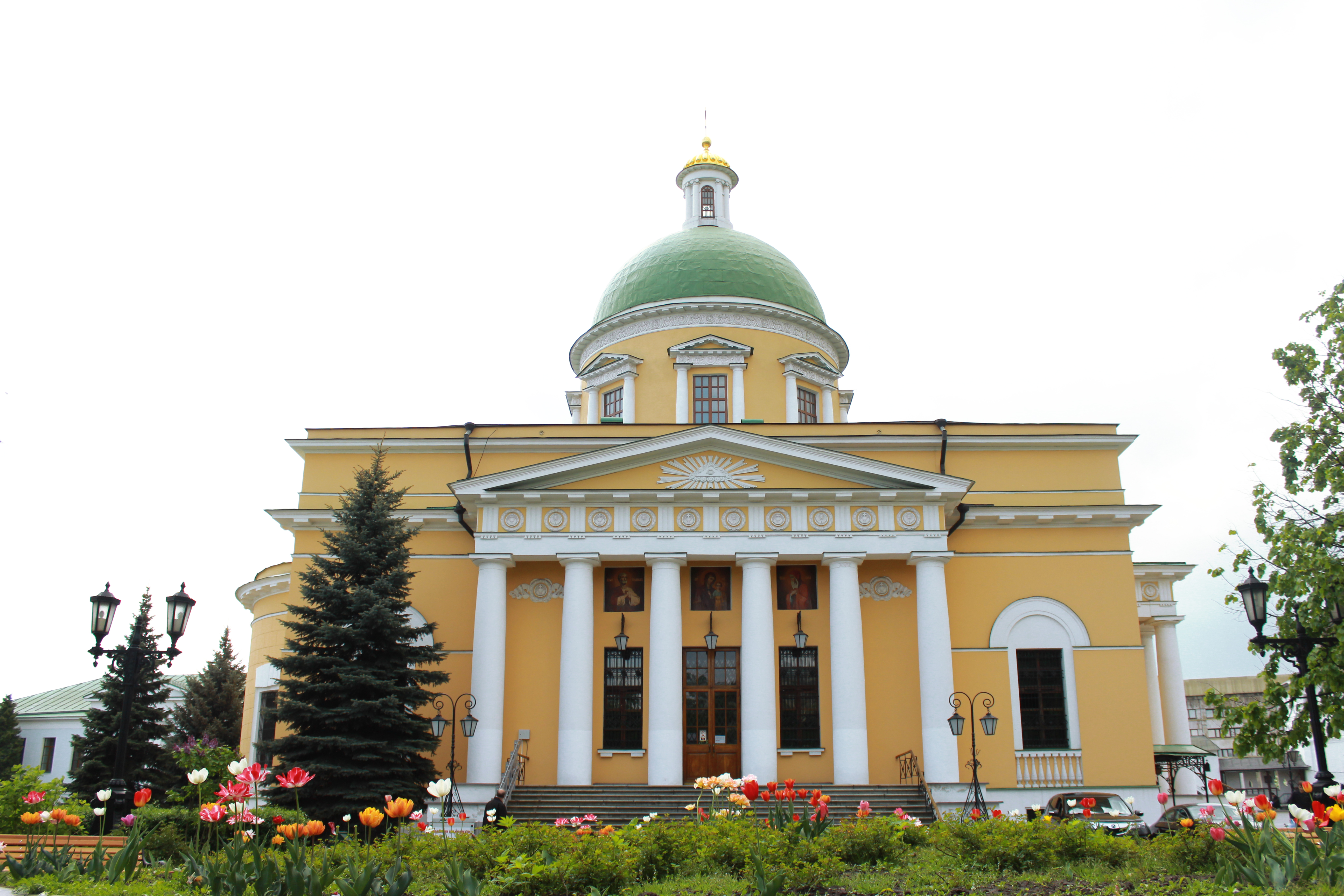 Монастырь Даниловский (Москва и Московская область, Москва, Даниловский Вал улица, 22)